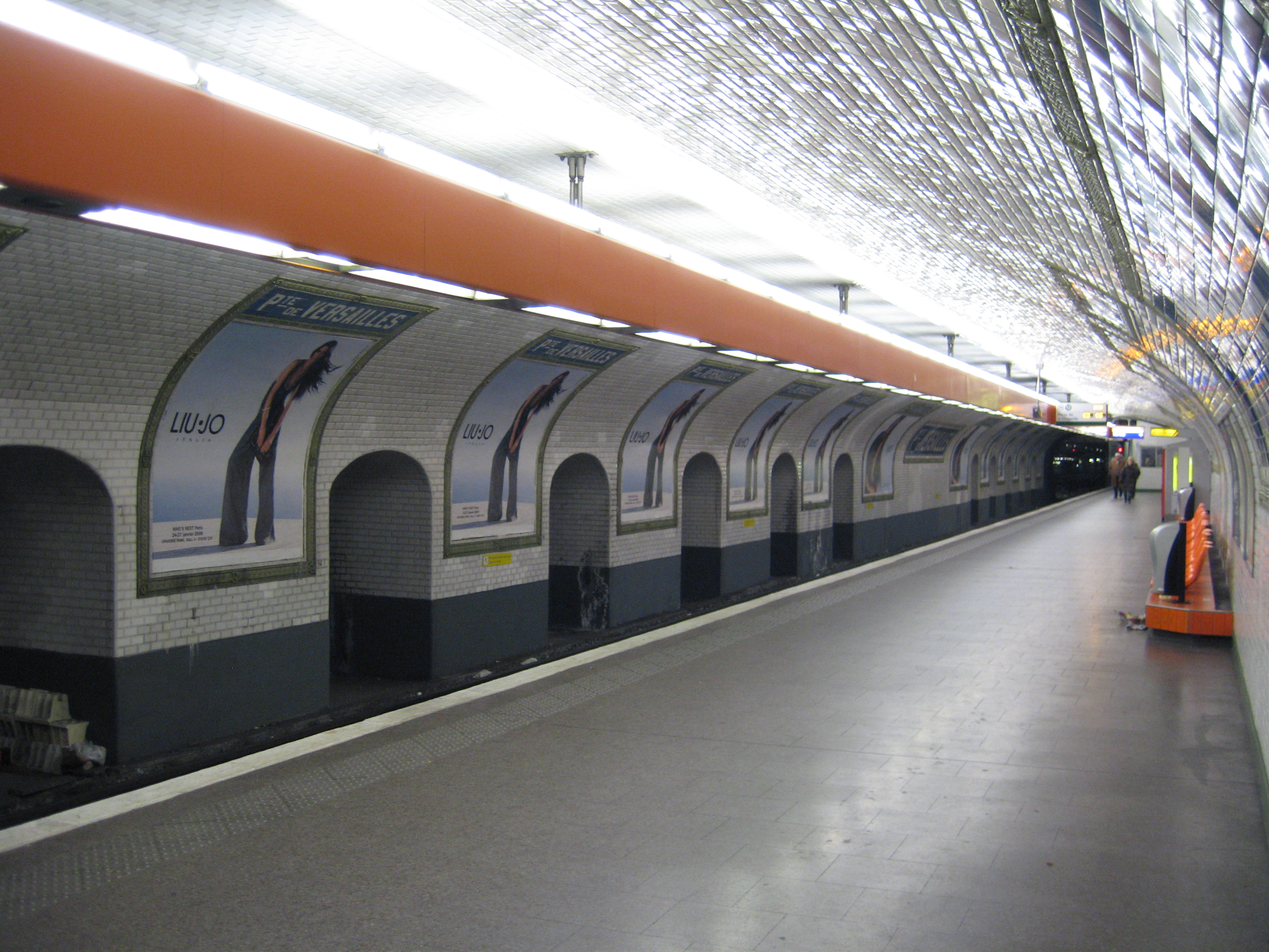 Station Porte de Versailles, ligne 12 du métro de Paris, vue depuis le sud du quai direction Porte de la Chapelle (nord). Les voies dans l'autre sens sont derrière les pilliers.